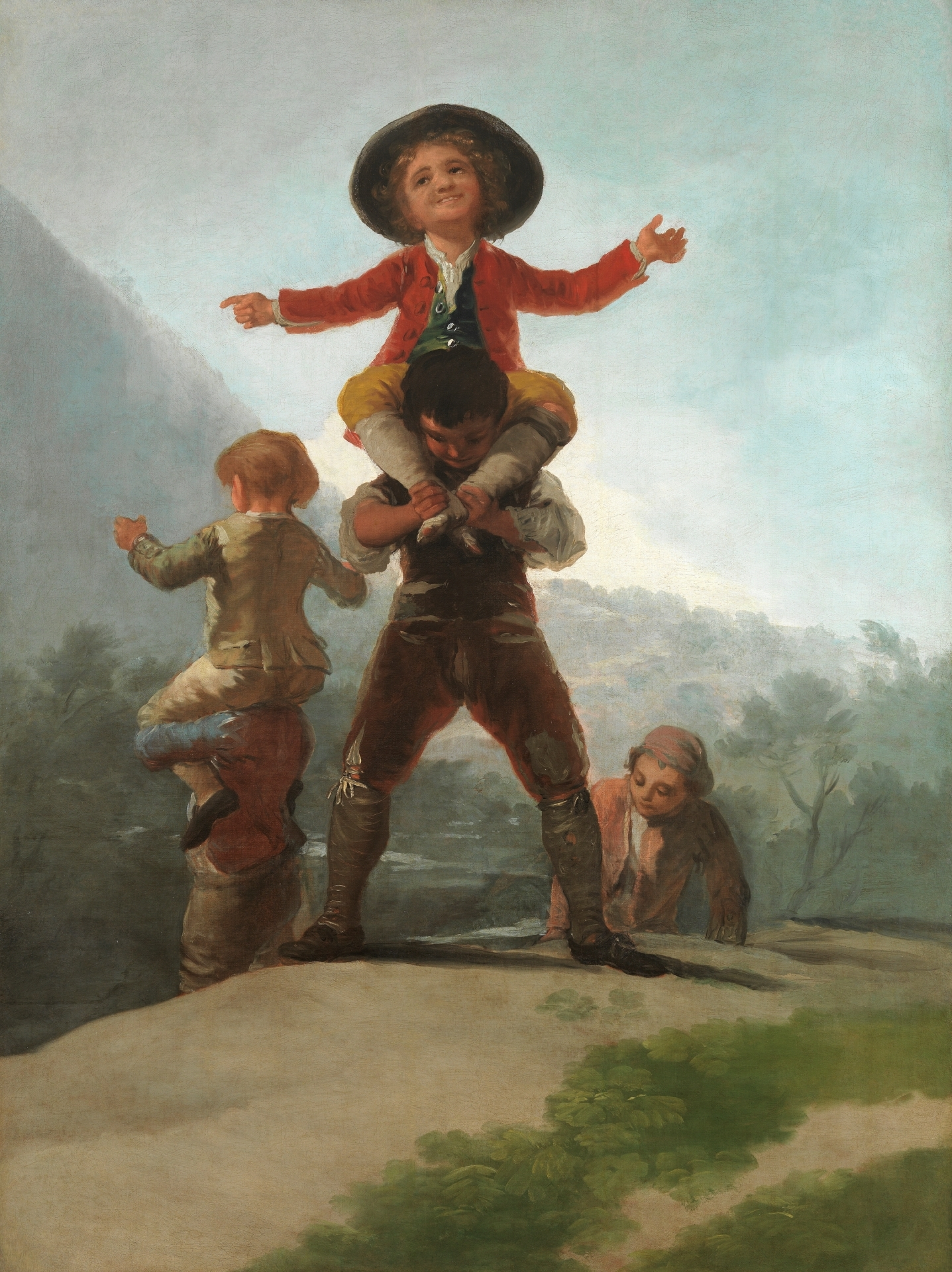 Cartones para tapices.